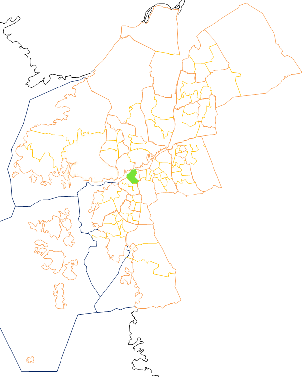 Karta som visar primärområdes belägenhet i Göteborg